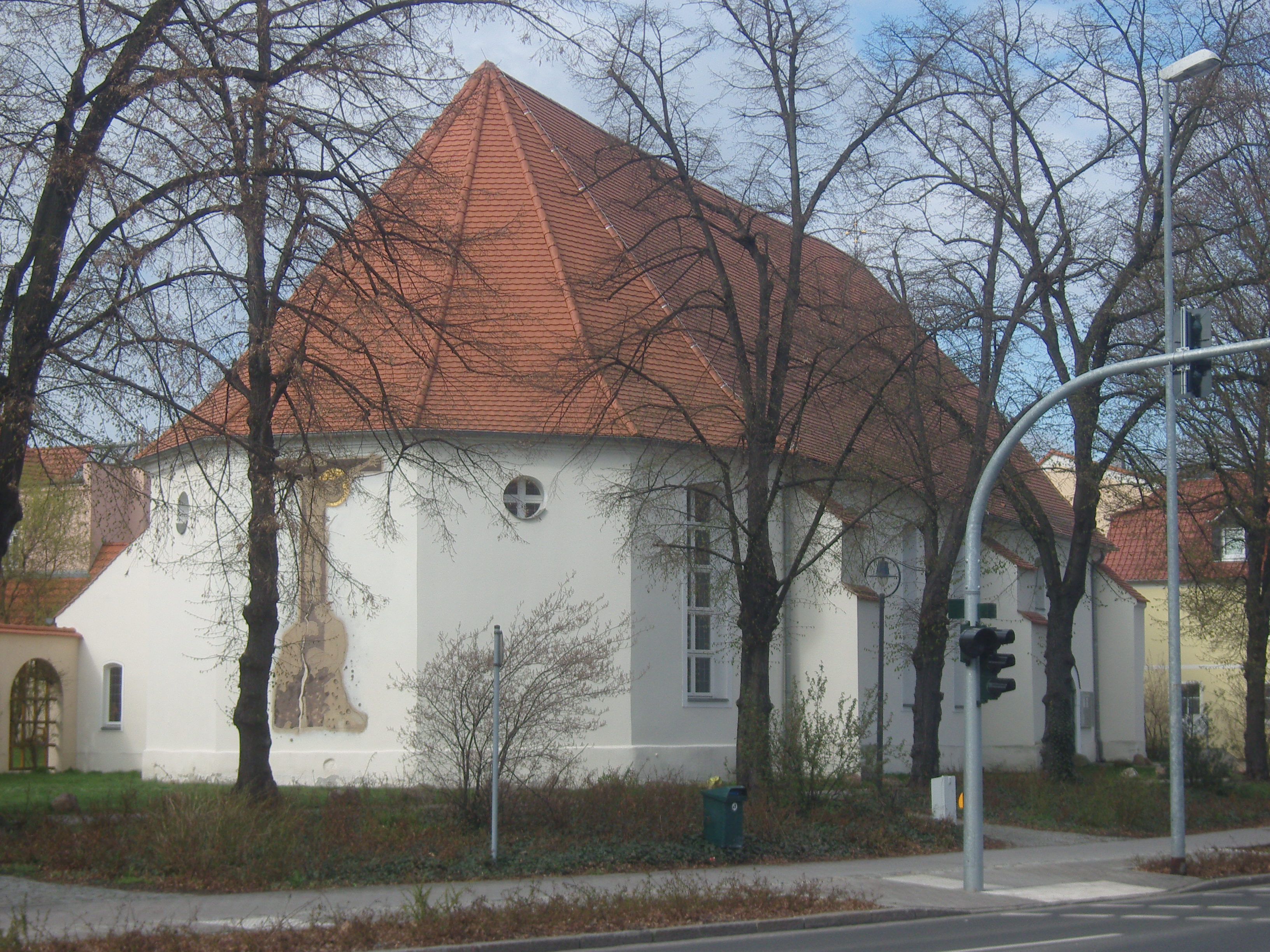 Rückansicht der Wendischen Kirche in Senftenberg, mit Sgraffito von Günter Wendt; Baudenkmal